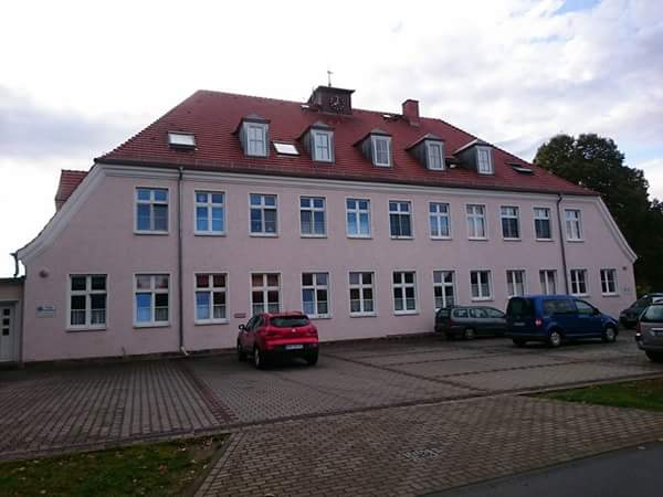 Schulgebäude Im Ortsteil Clara-Zetkin-Siedlung Eberswalde